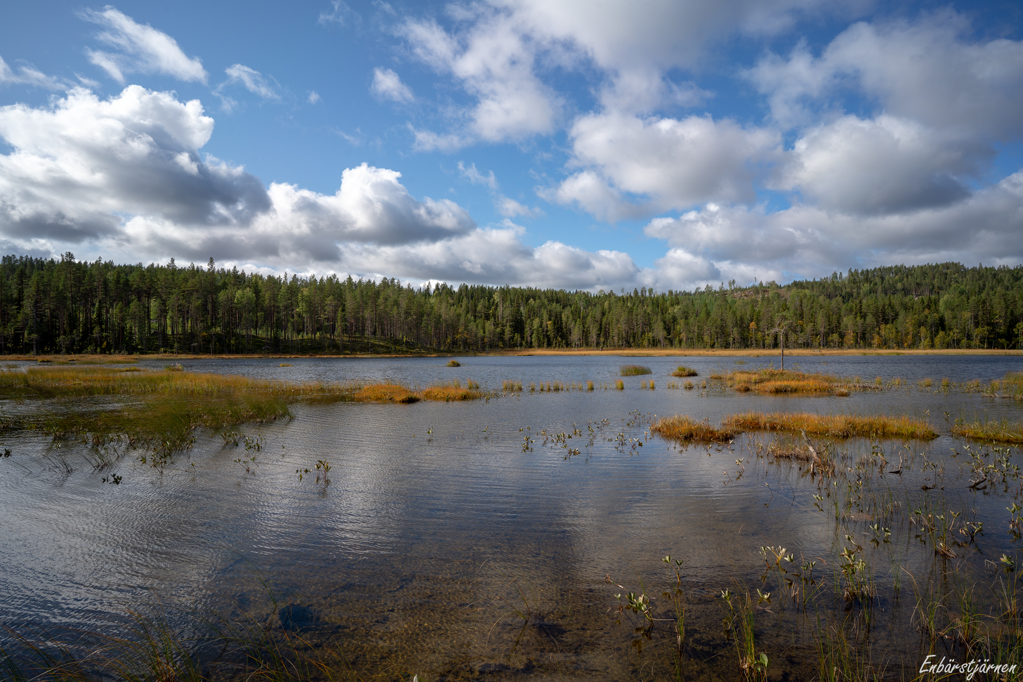 Enbärstjärnen ligger 200 meter söder om Lägstaån. Vy mot SV.